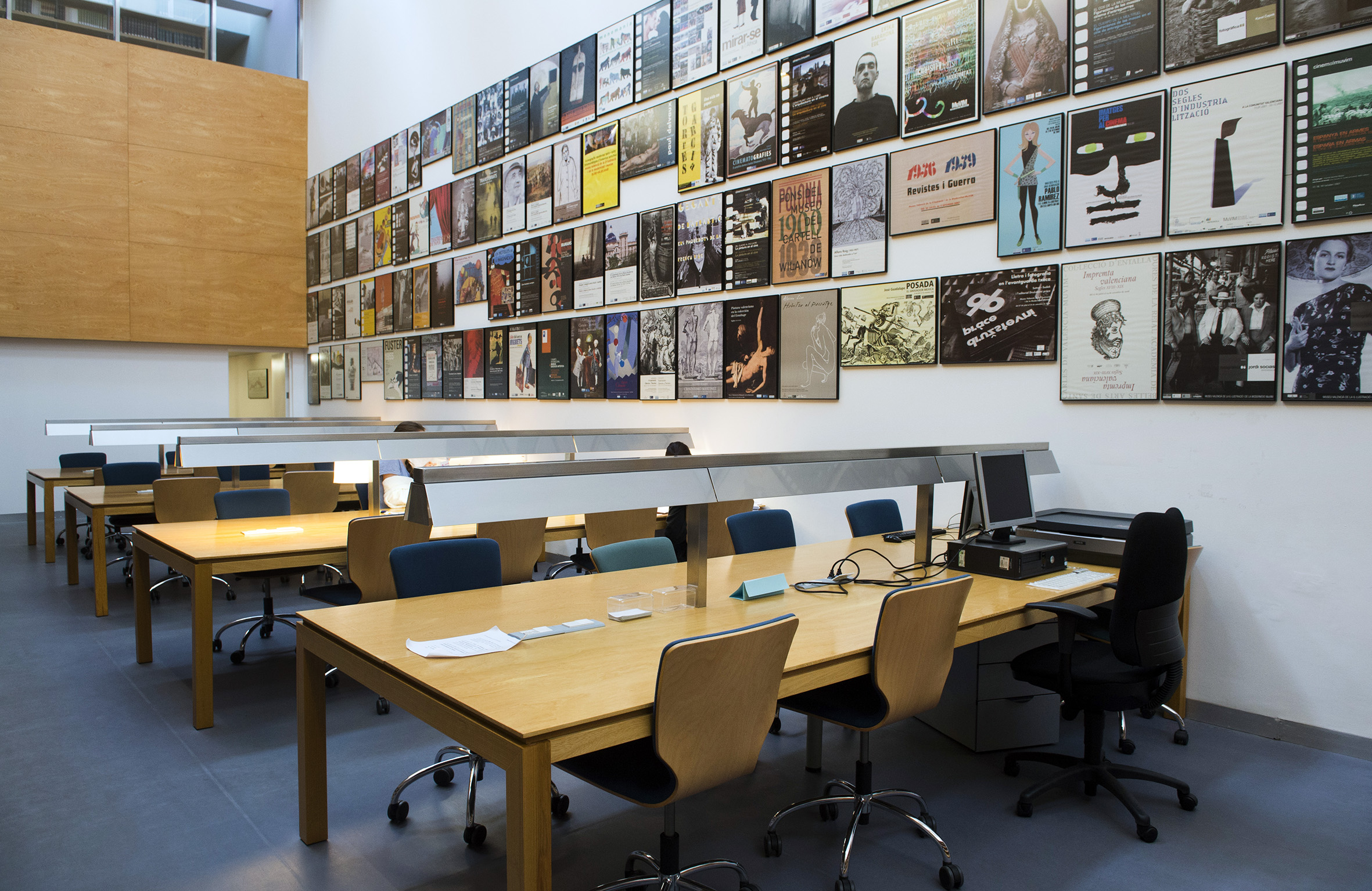 Sala de lectura biblioteca del MuVIM